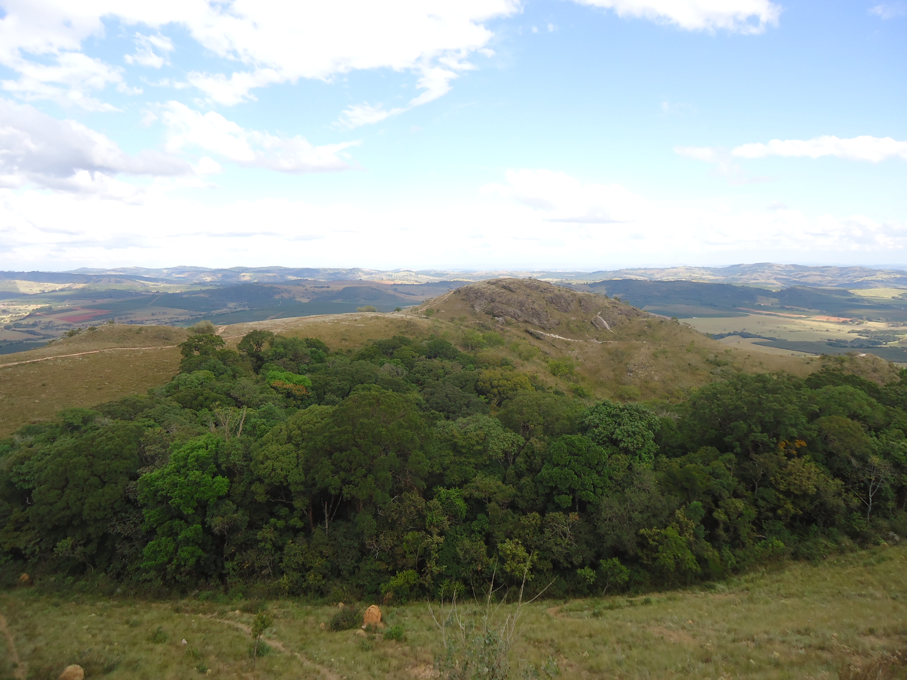 Remanescentes de florestas em uma das reentrâncias da Serra de Três Pontas.